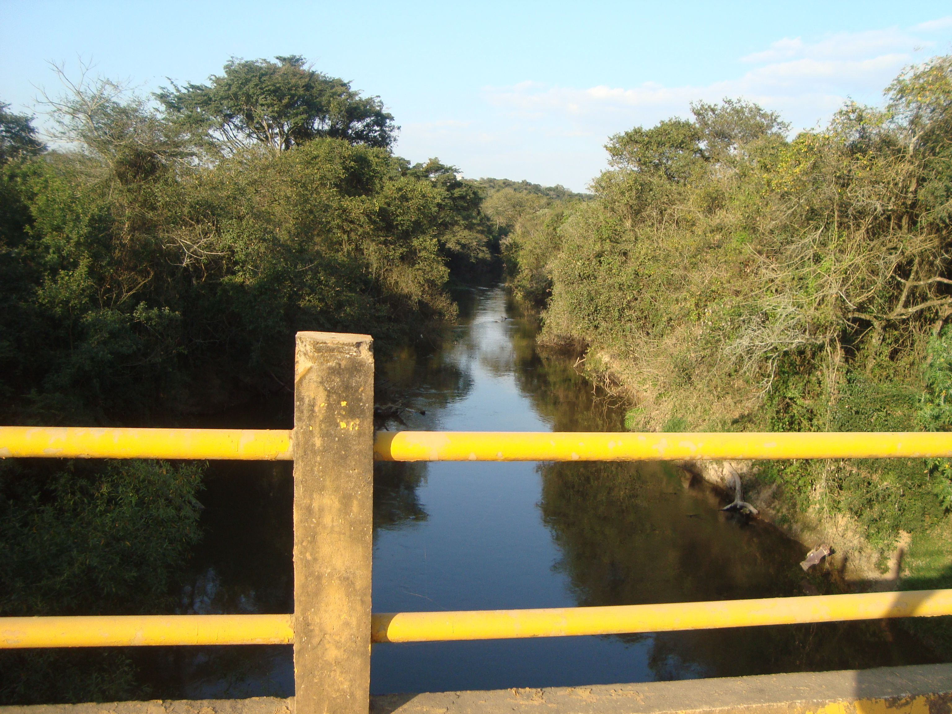 Iperó - State of São Paulo, Brazil